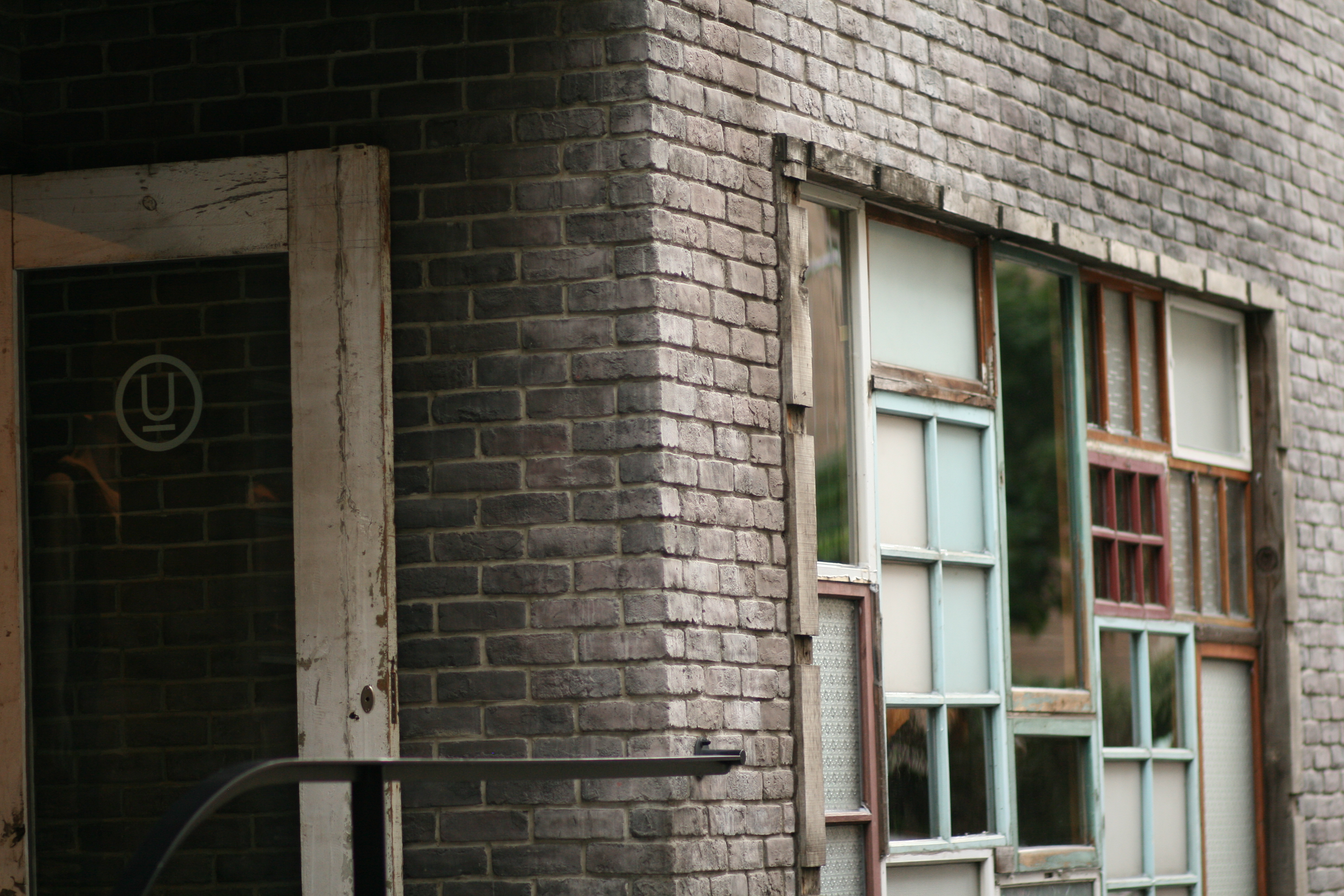 Undercover taipei